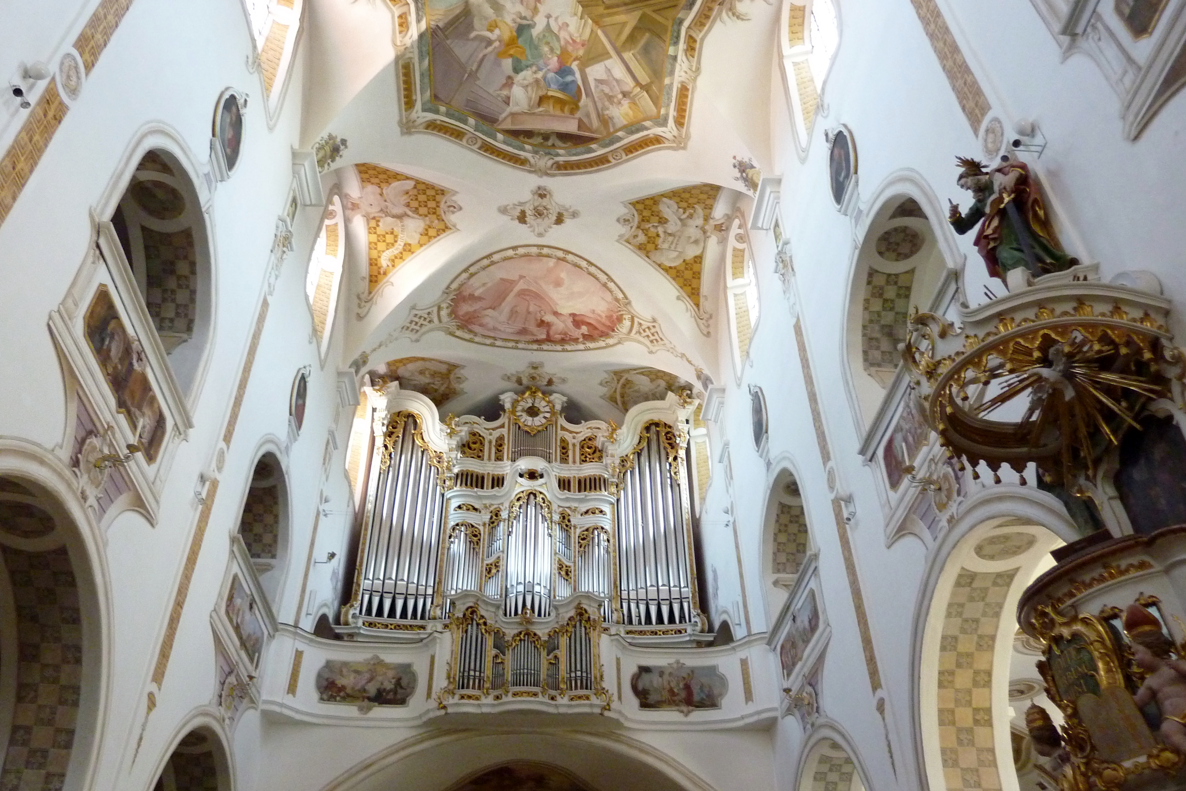 Katholische Pfarrkirche St. Johannes Evangelist und Petrus, ehemalige Klosterkirche des Prämonstratenserklosters Klosters Ursberg in Ursberg im Landkreis Günzburg (Bayern), Innenraum mit Blick zur Orgel